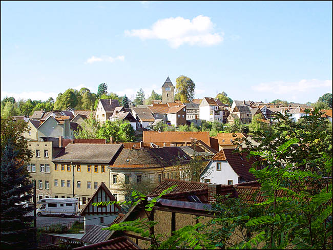 Stadtroda